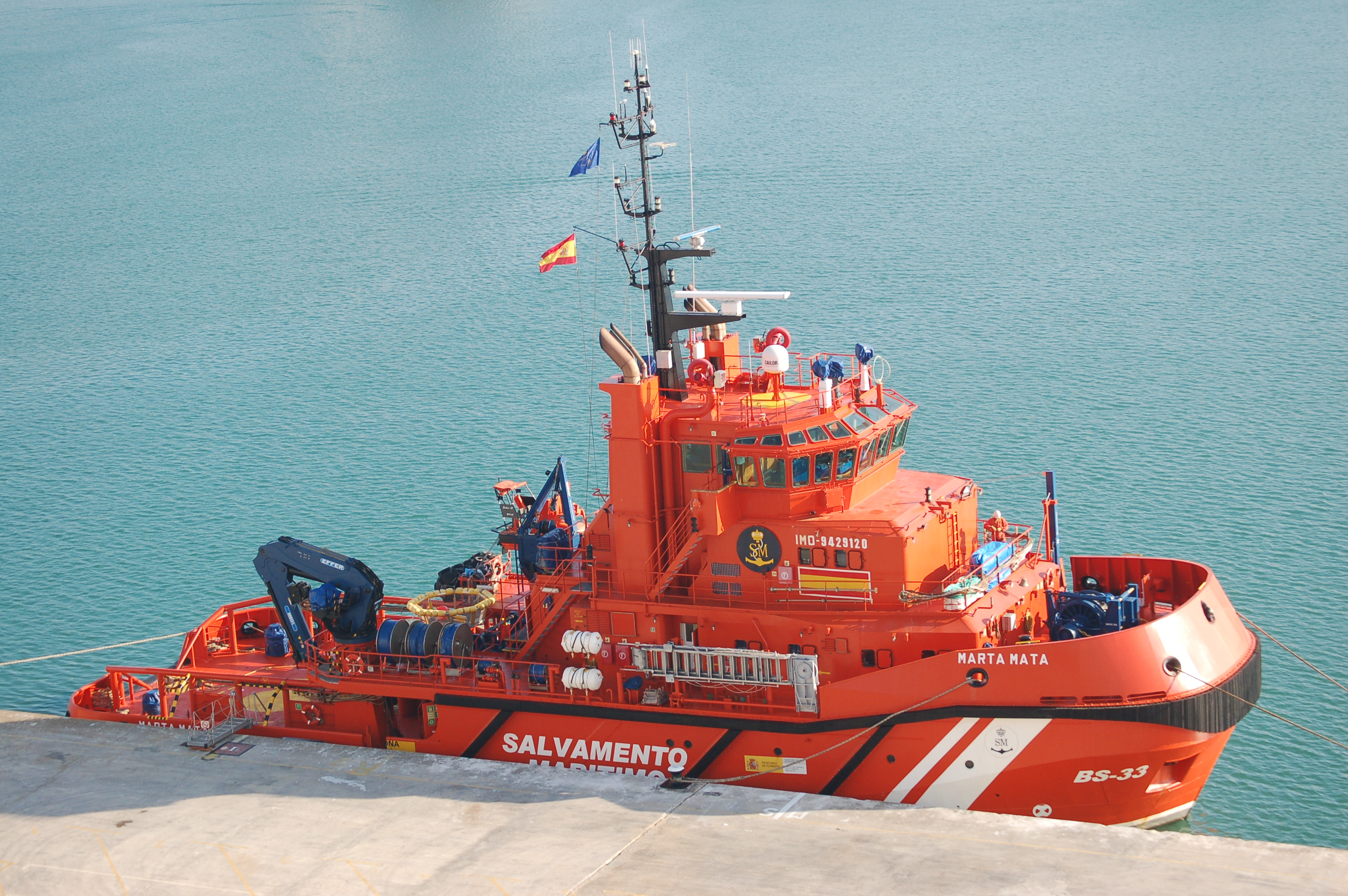 País: España - Salvamento Marítimo Clase, [Tipo]: María de Maeztu. Constructor: Boluda Shipyards, Valencia, España. Fecha botadura: 23 de mayo de 2008. Dimensiones ( metros ): 39,7 x 12,5 x 4,2 Propulsión: 2 x diesels ABC 8DZC-1000-175 ( 5.500 cv ). Velocidad ( nudos ): 13. Autonomía ( millas ): 6.000. Dotación: 10 + 2. Capacidad de transporte: 359 m3 gasoil, 115m3 agua 21m3 aceite, espuma 13m3, detergente 12m3. Indicativo: ECNY